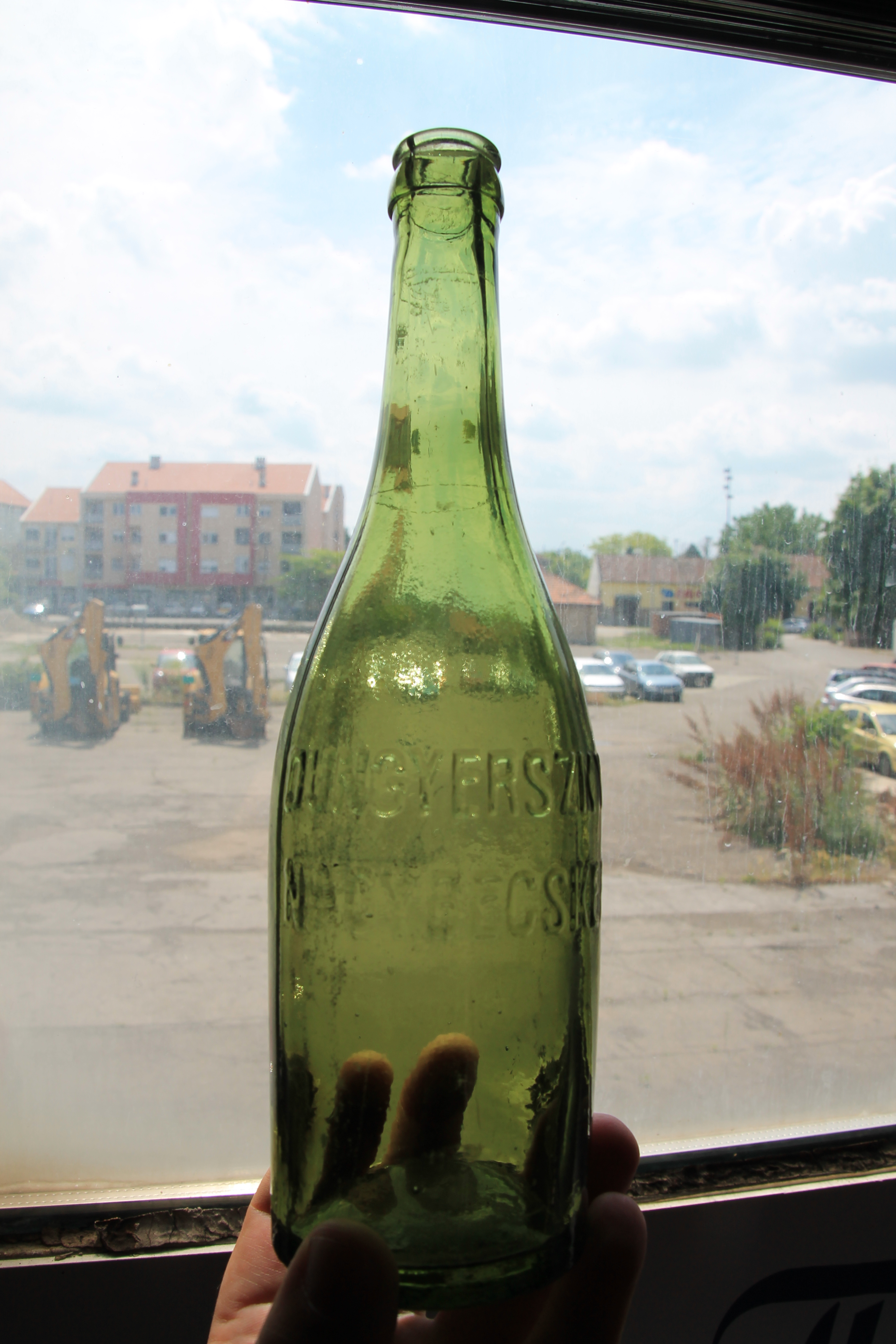 Muzej piva